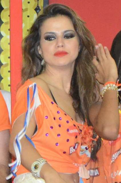 A triz Laryssa Dias no Carnaval de Salvador.